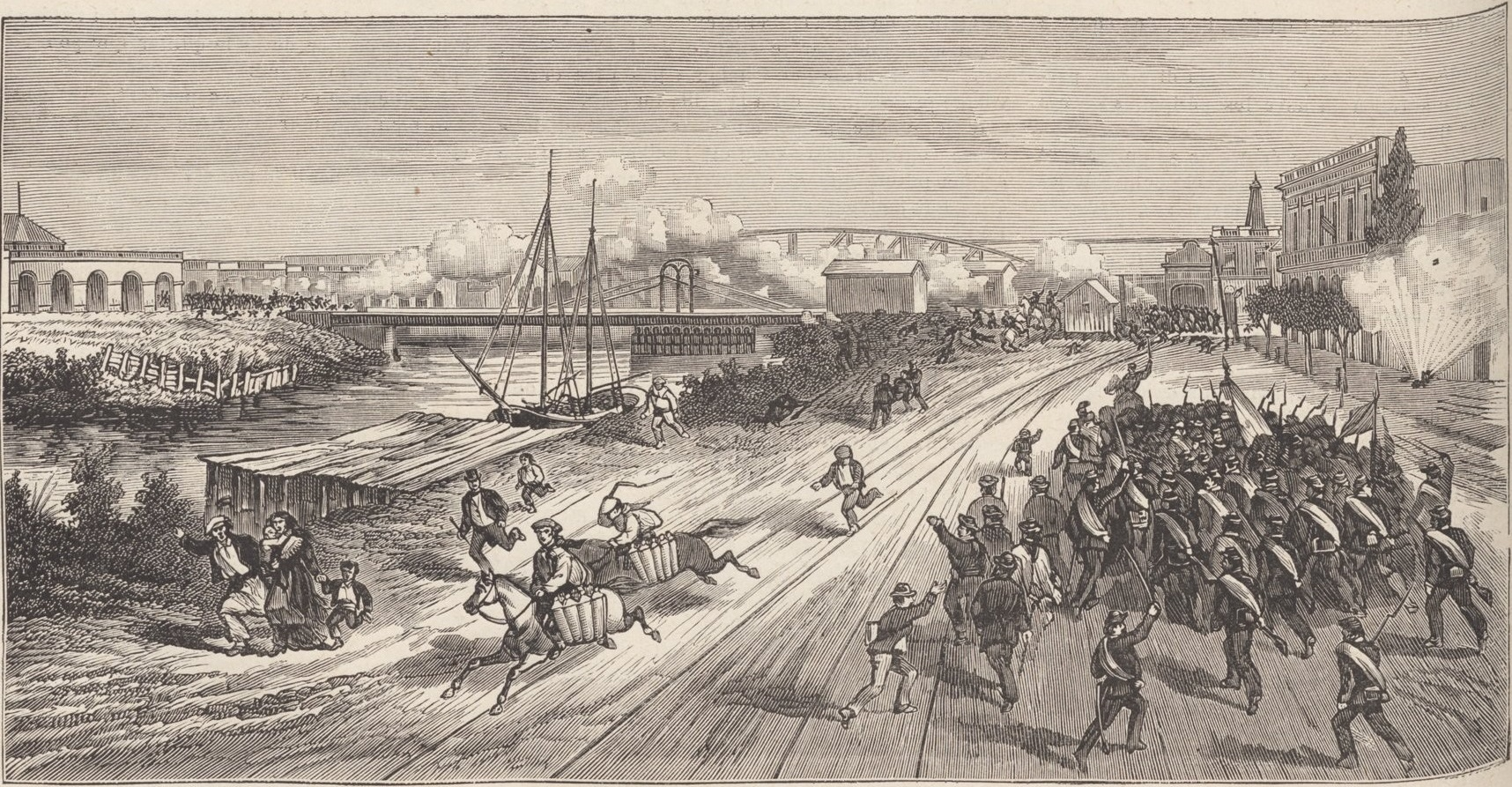 Combat du 20 juin. — Défense du pont de Barrancas par la garde nationale de Buénos-Ayres. (N.B.: la forme correcte est Barracas.)